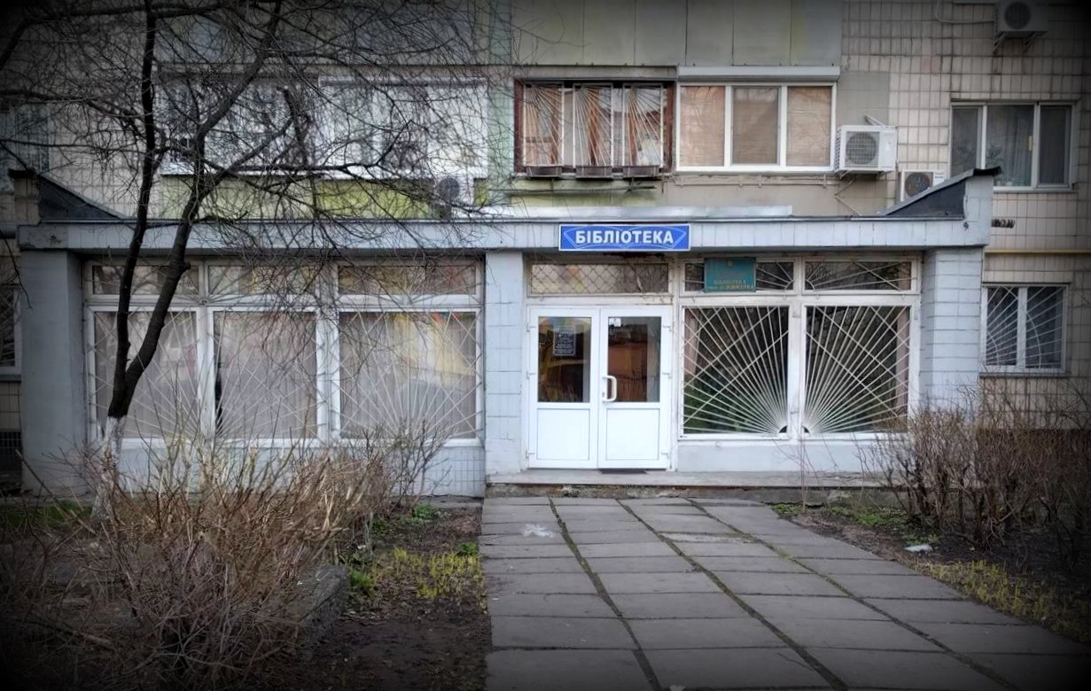 Фасад бібліотеки ім.Довженка